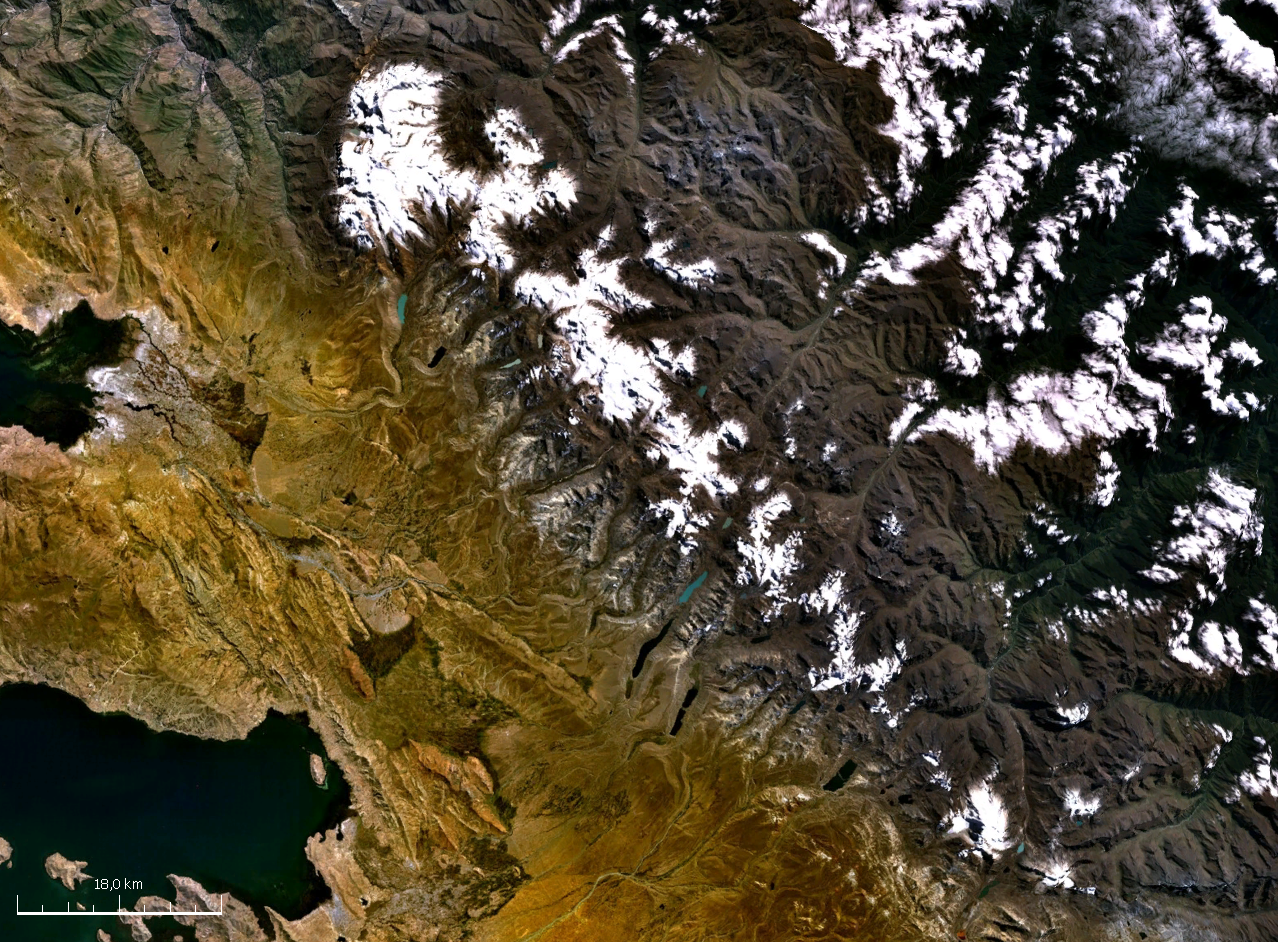 Vista satelital de la Cordillera Real o Central de Bolivia.